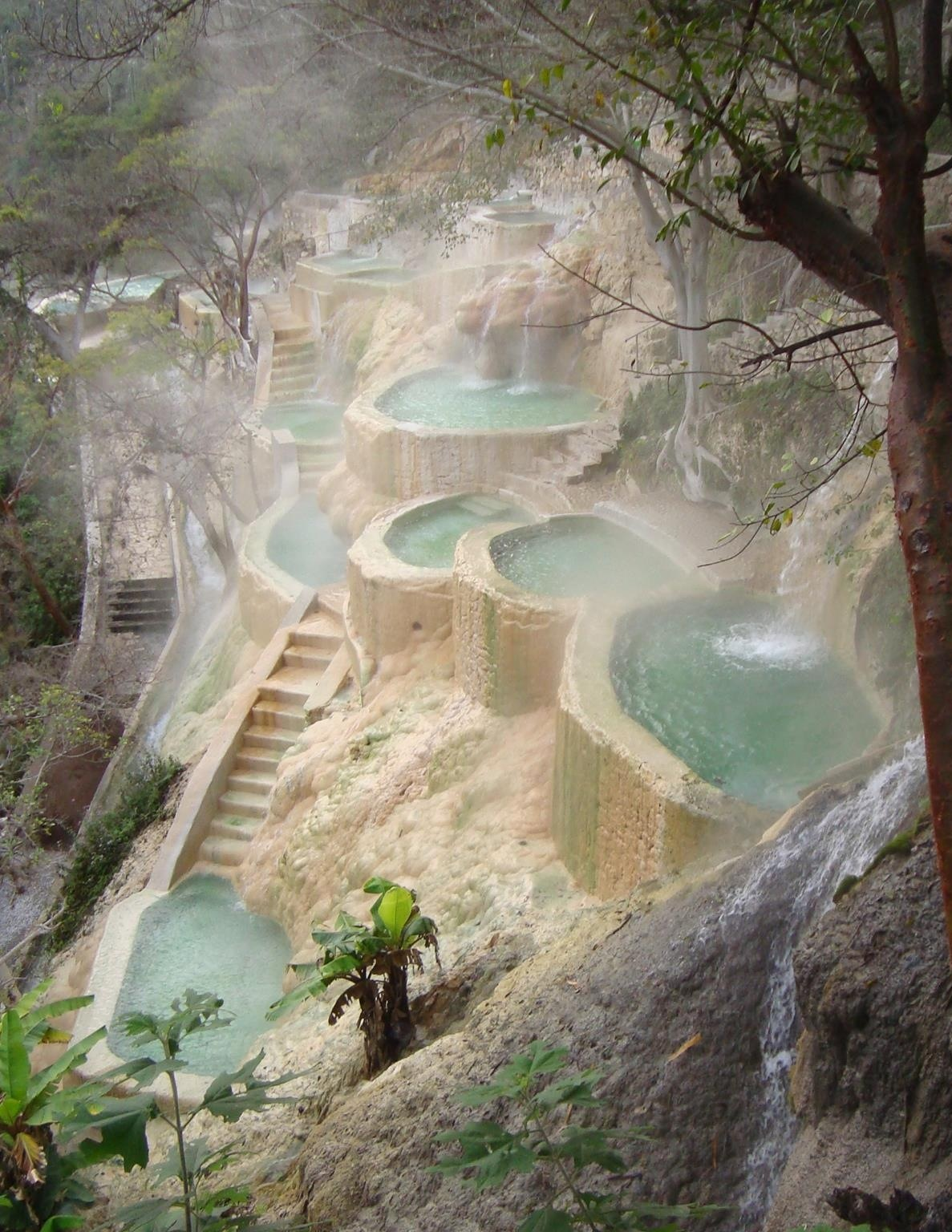 "Poza" "tolantongo" "agua" "water" "caliente" "hot"